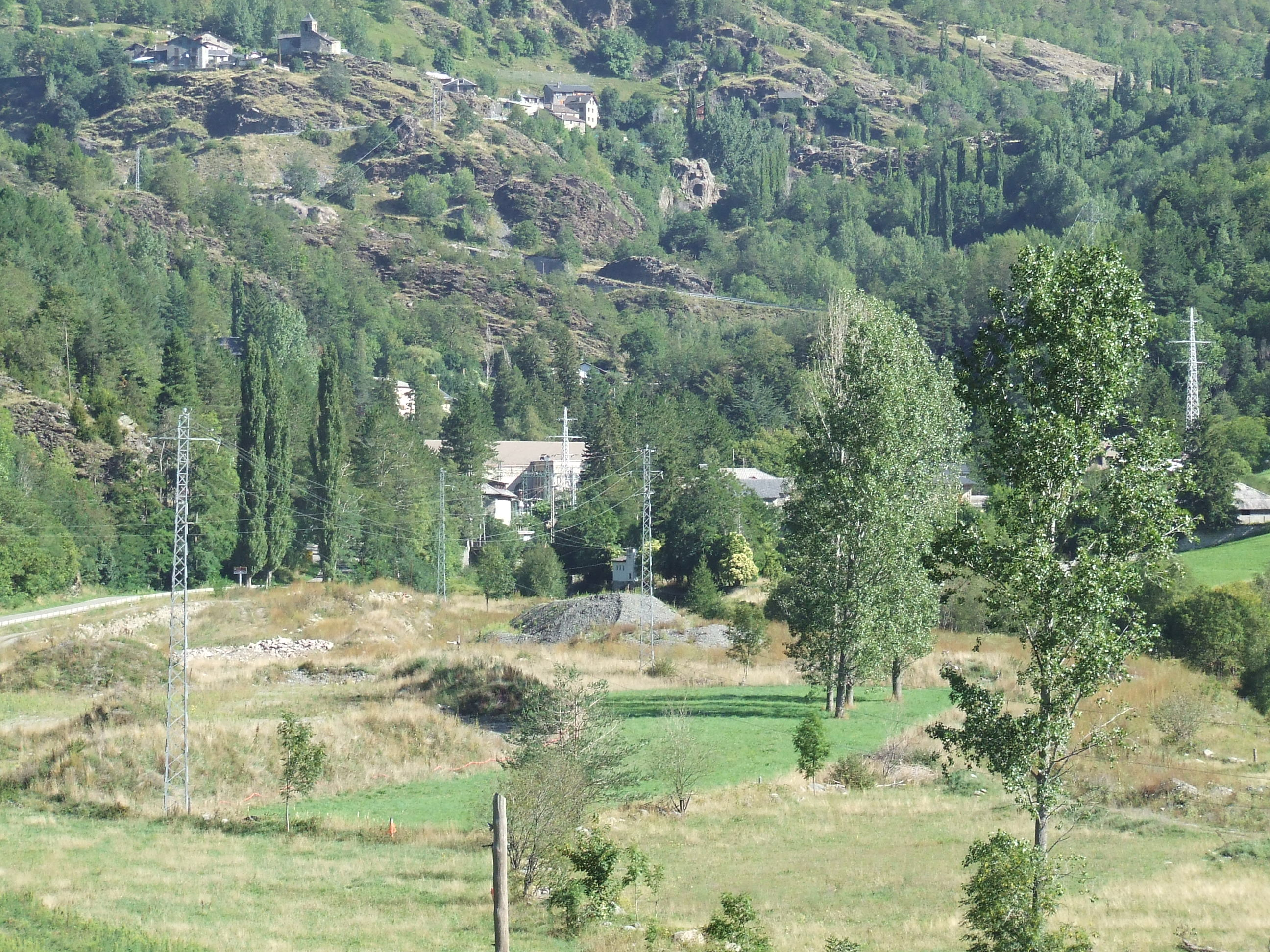 La Central de Cabdella (la Torre de Cabdella, Pallars Jussà)